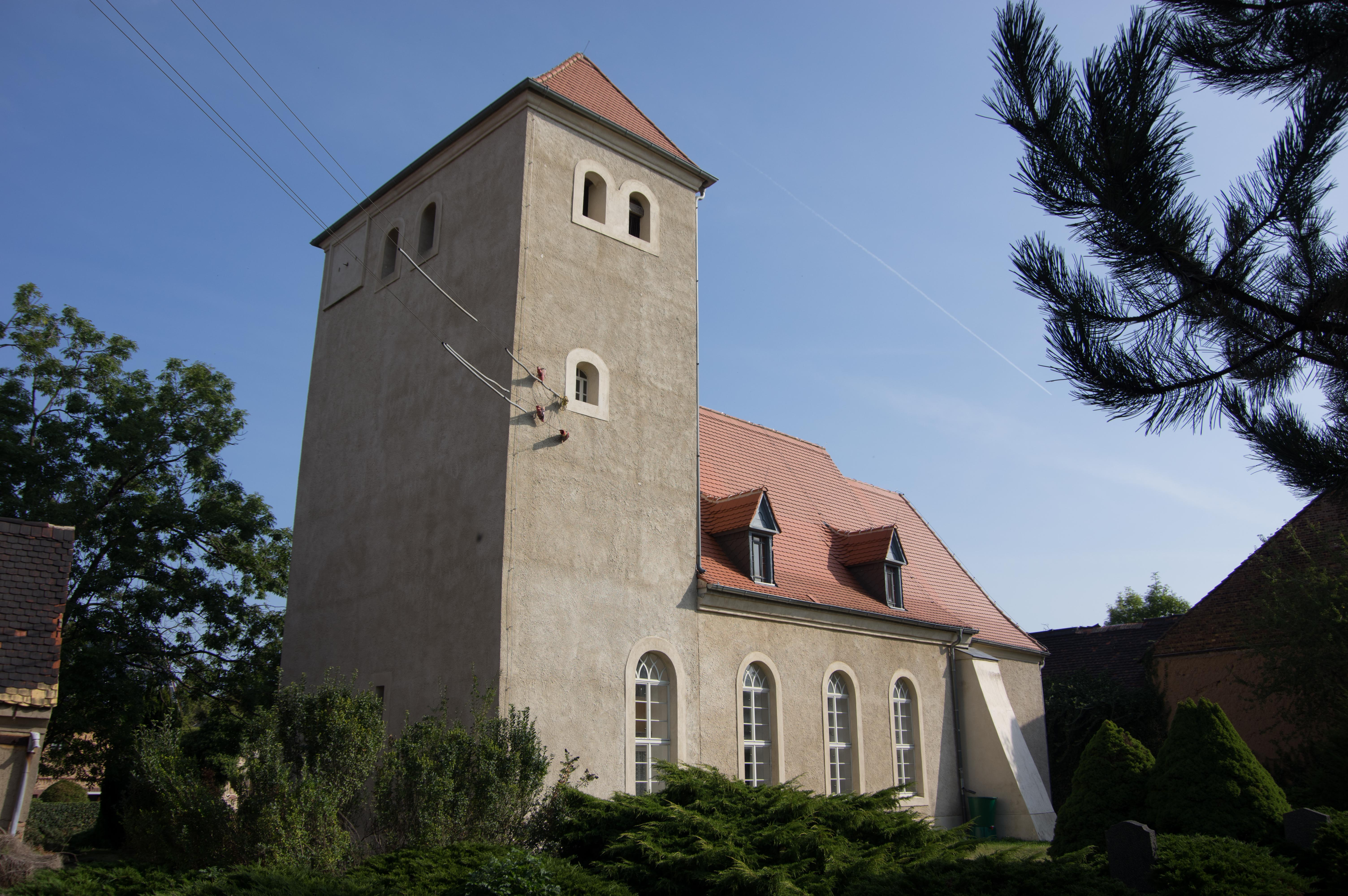 Zörbig Ortsteil Großzörberitz. Die Kirche in Großzöberitz steht unter Denkmalschutz.